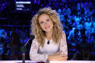 Деси Добрева в "България търси талант"